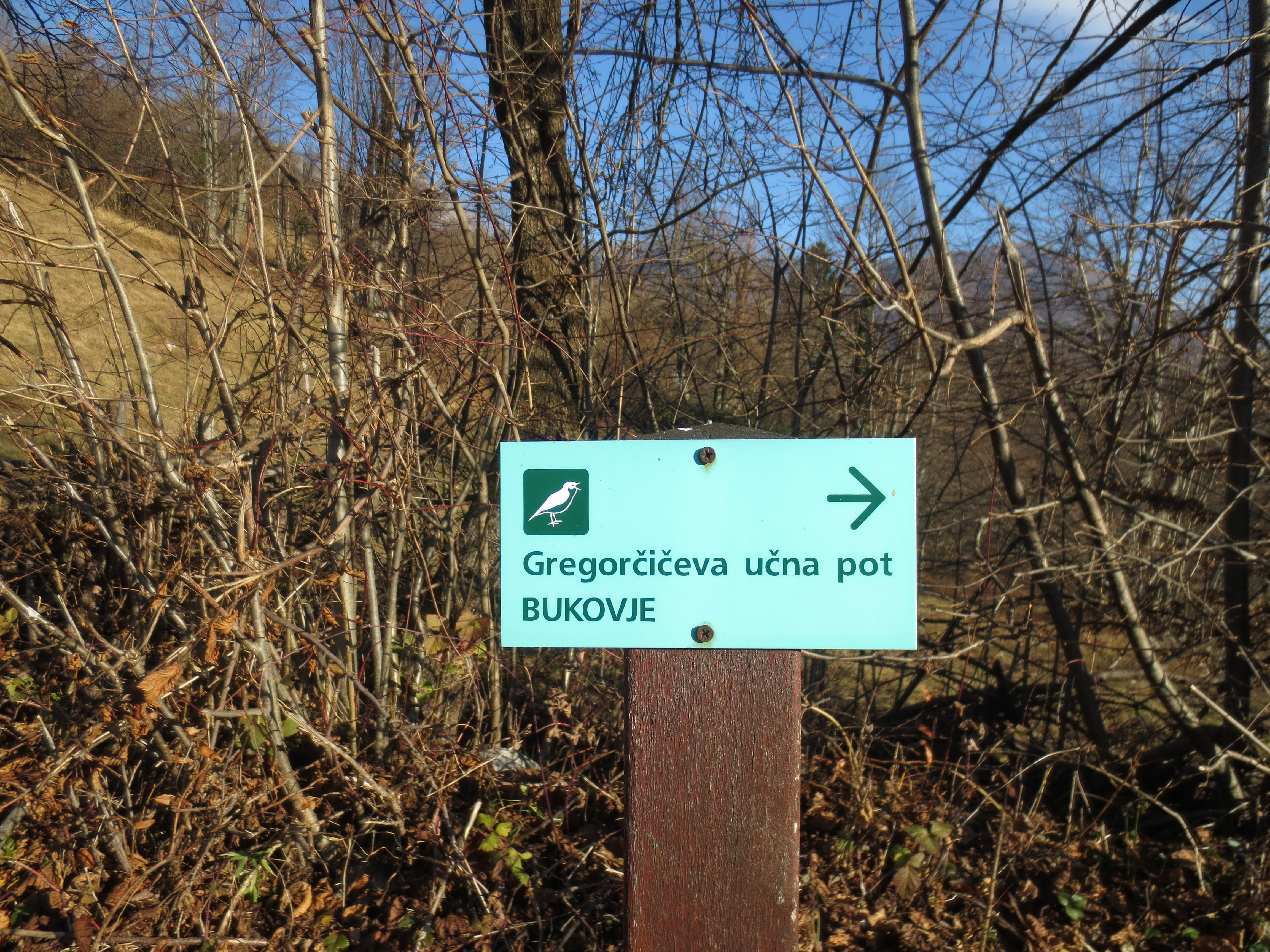 Tabla, ki označuje Gregorčičevo učno pot